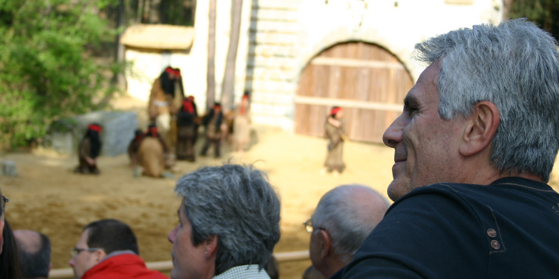 Der Namensgeber des Vereins auf der Waldbühne: Gojko Mitic.